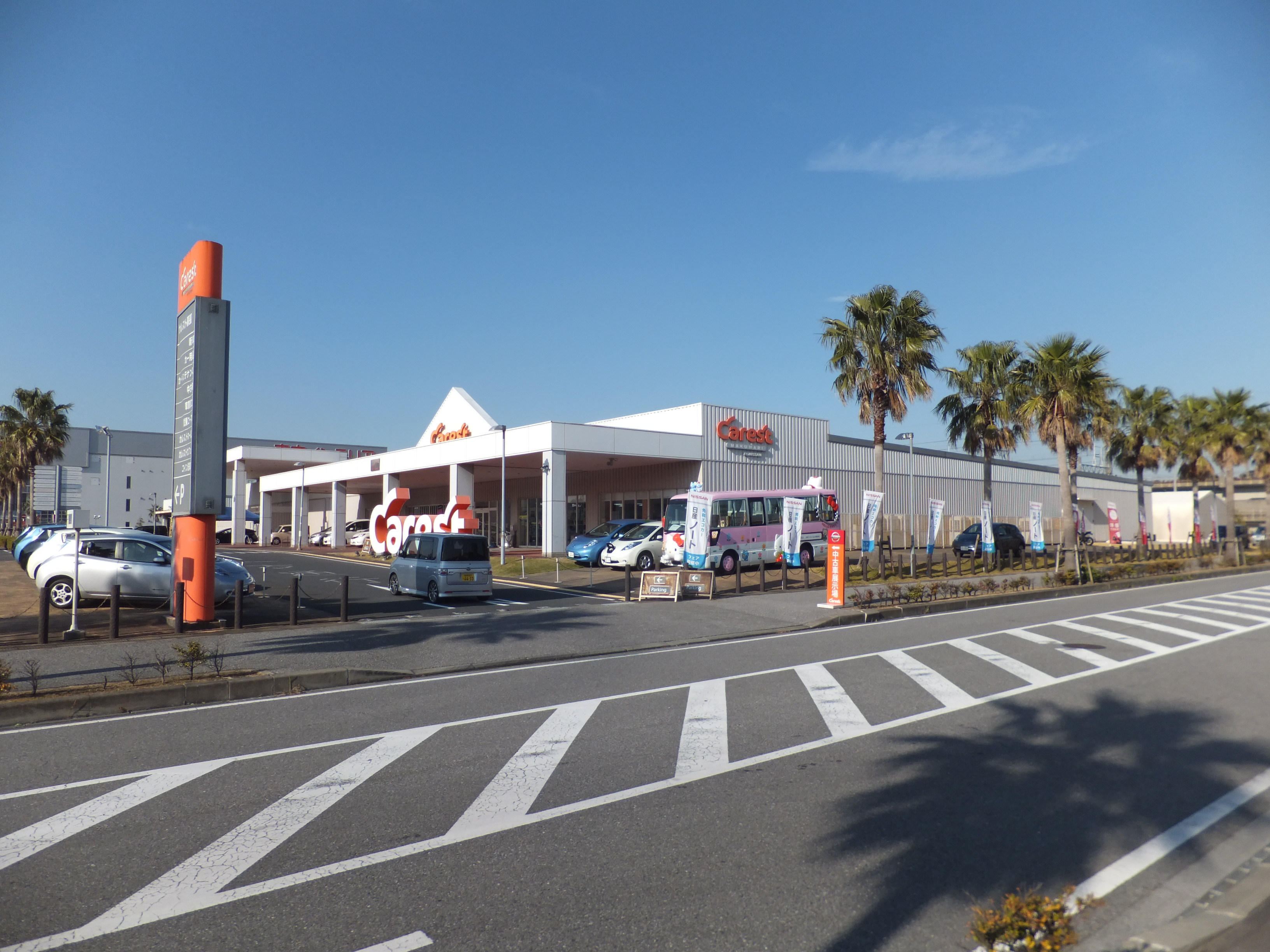 日産のカーライフショップ、カレスト幕張（千葉県習志野市）